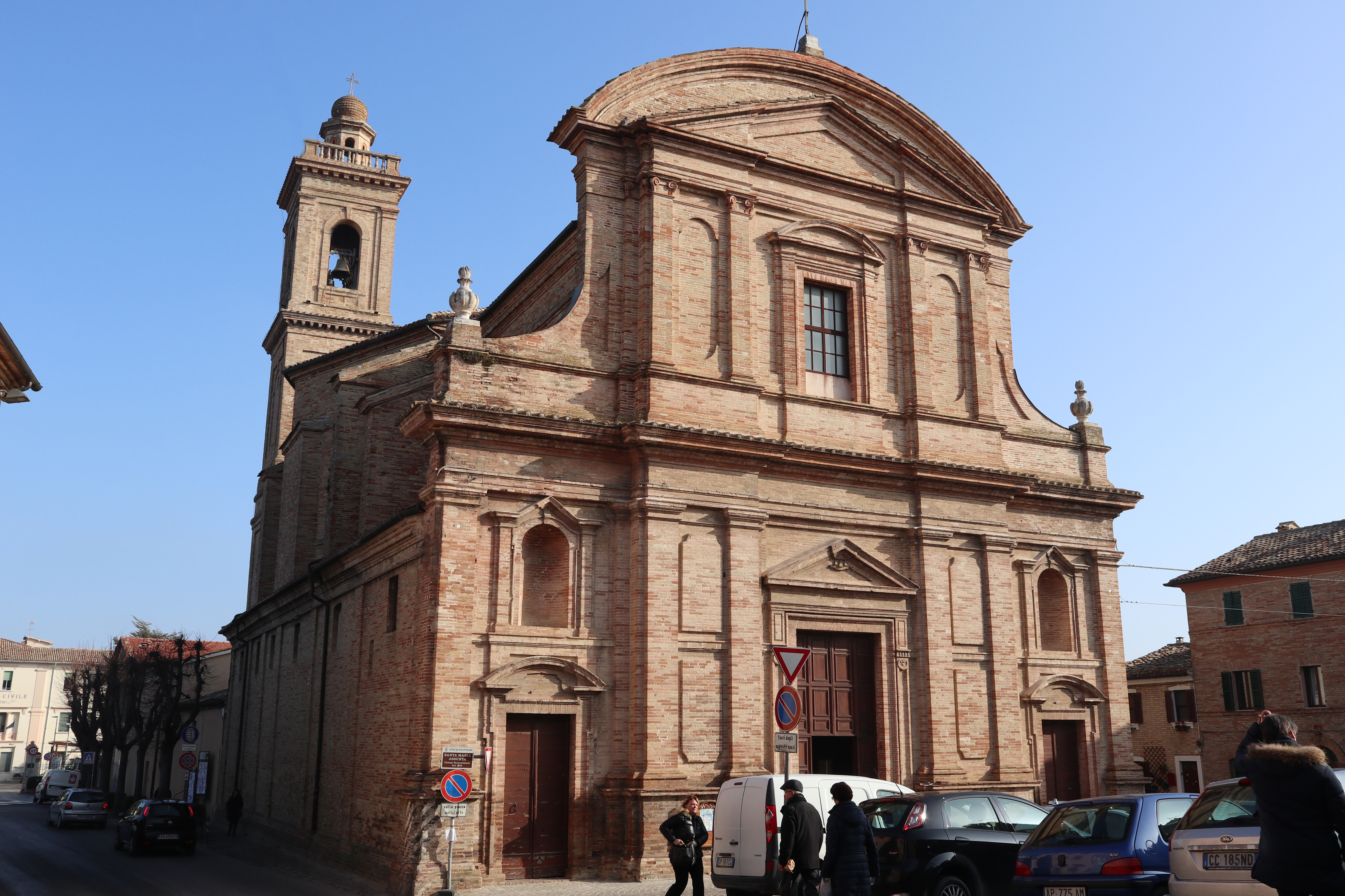 Facciata, Matteo de' Rossi, 1751-56